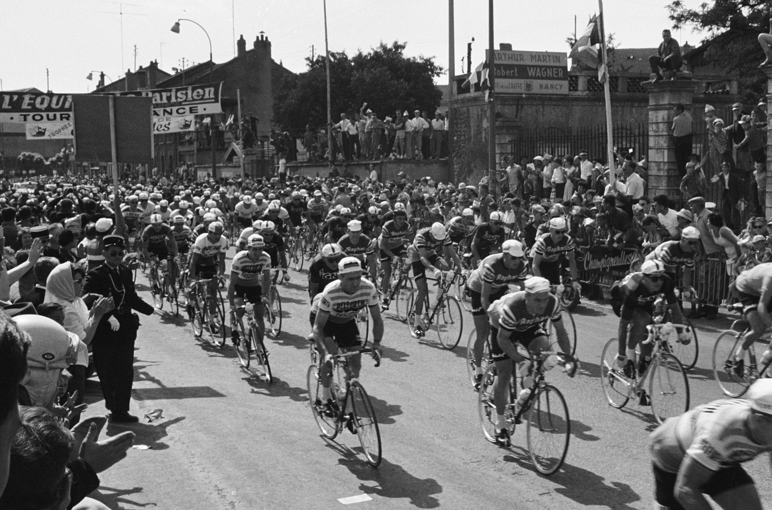 Tour de France 1962 , massale start bij Champigneulles